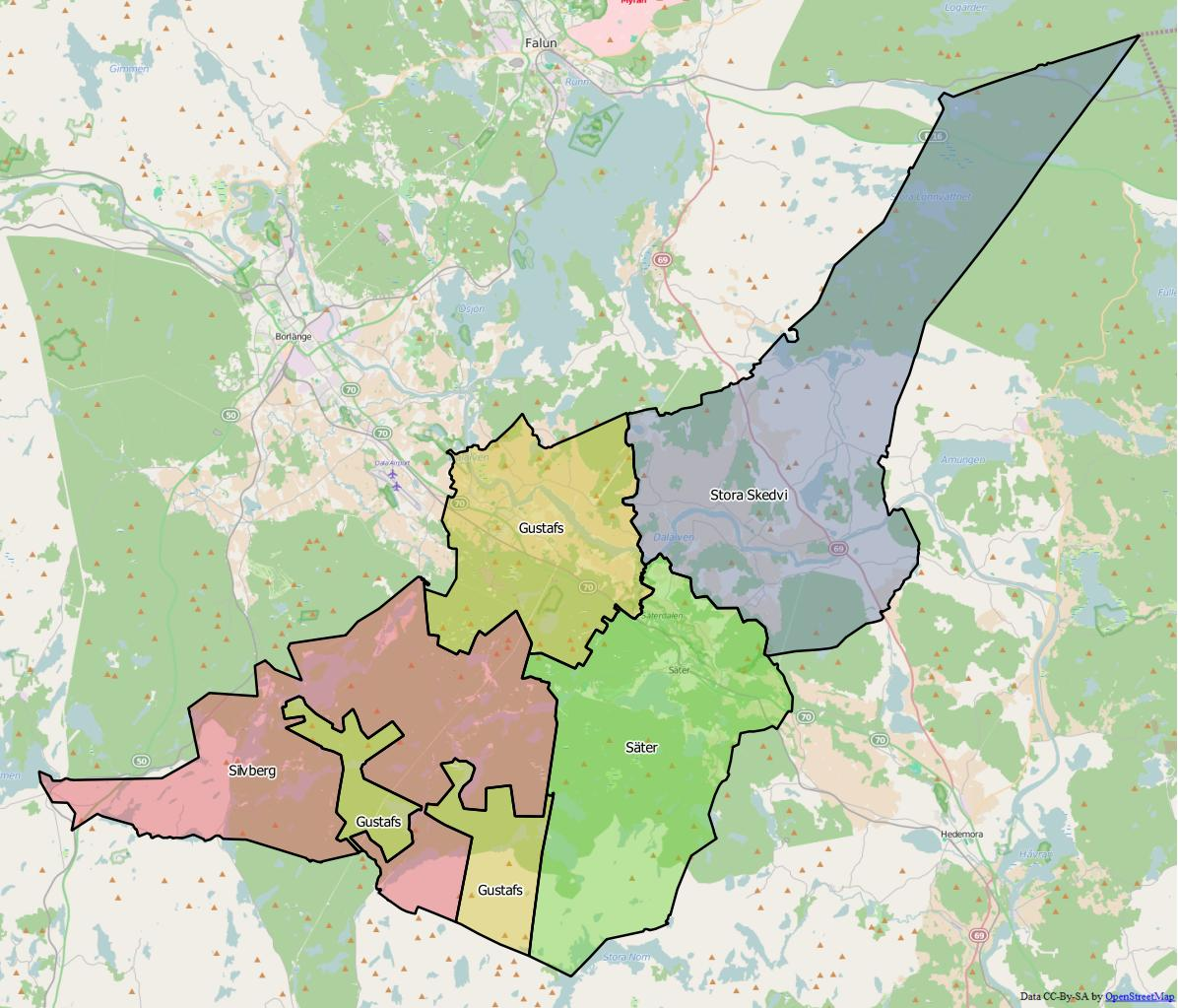 Distriktsindelningen i Sundsvalls kommun World file: 157.23349707996615621 0 0 -157.23349707996615621 1376041.09807152883149683 8282935.96519078779965639